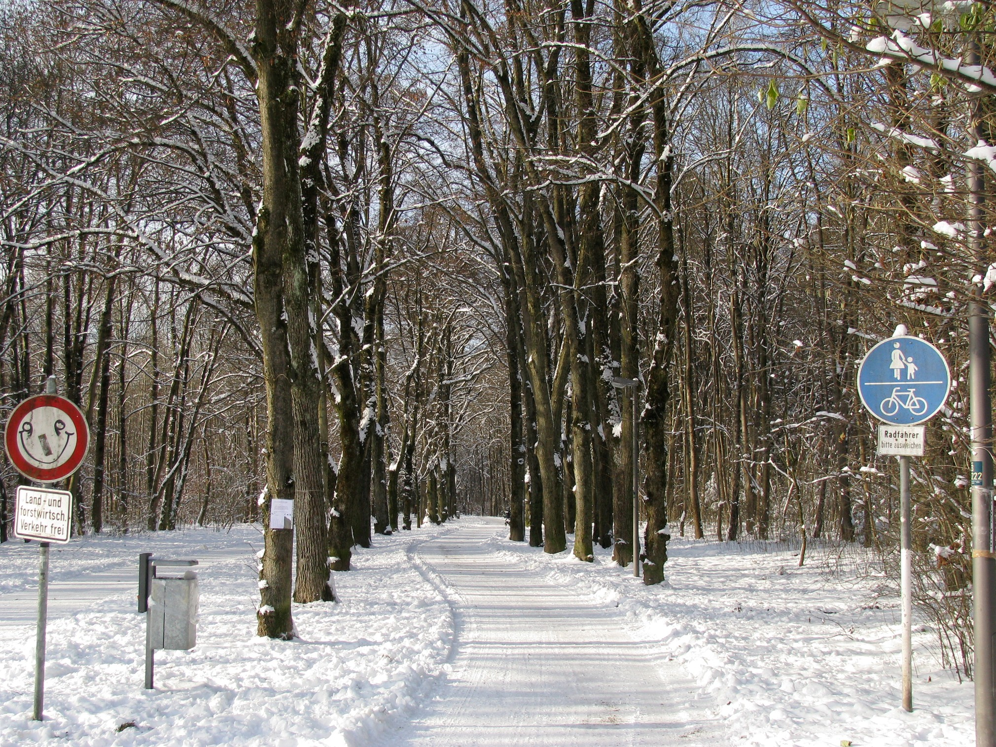 Sendlinger Wald (Südpark) in München; Weg Richtung Westen kurz hinter der Kreuzung mit der Inninger Straße